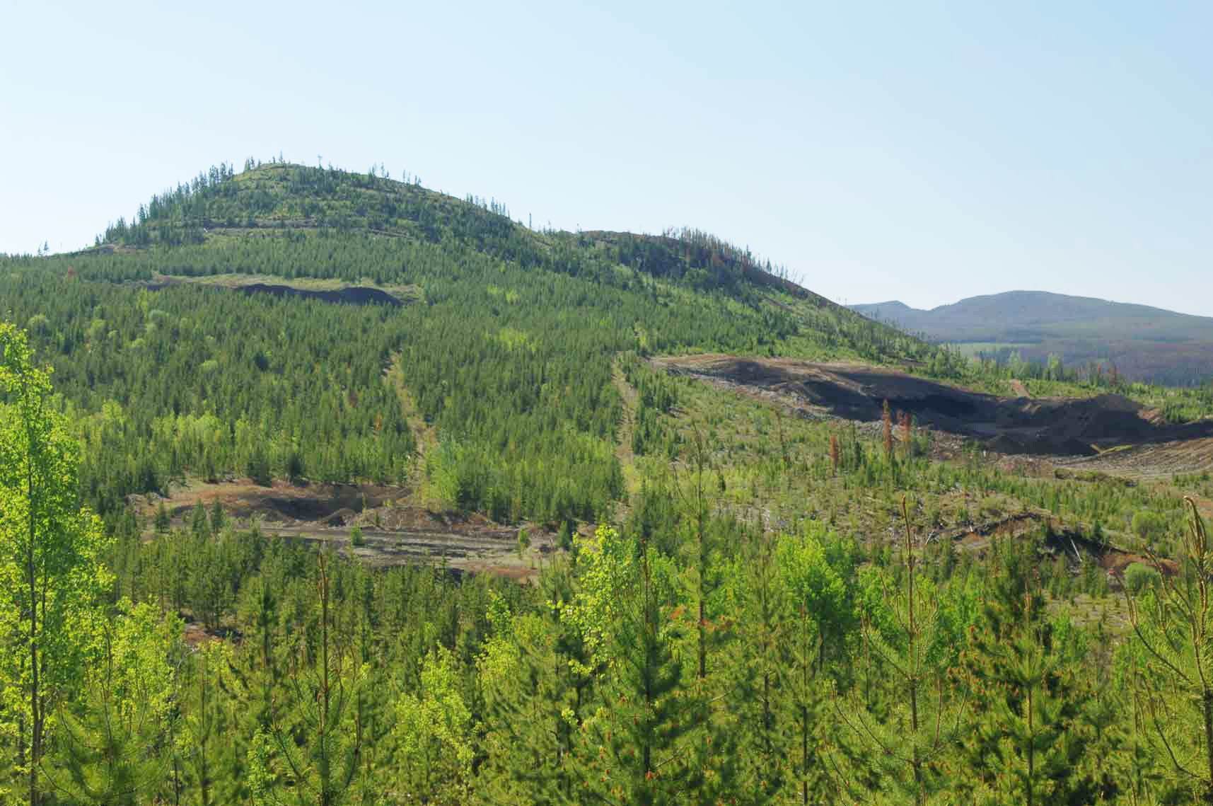 A small tree-covered volcano called Nazko Cone